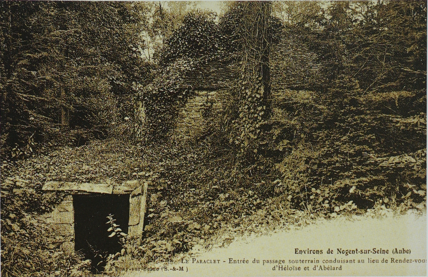 Abbaye du Paraclet